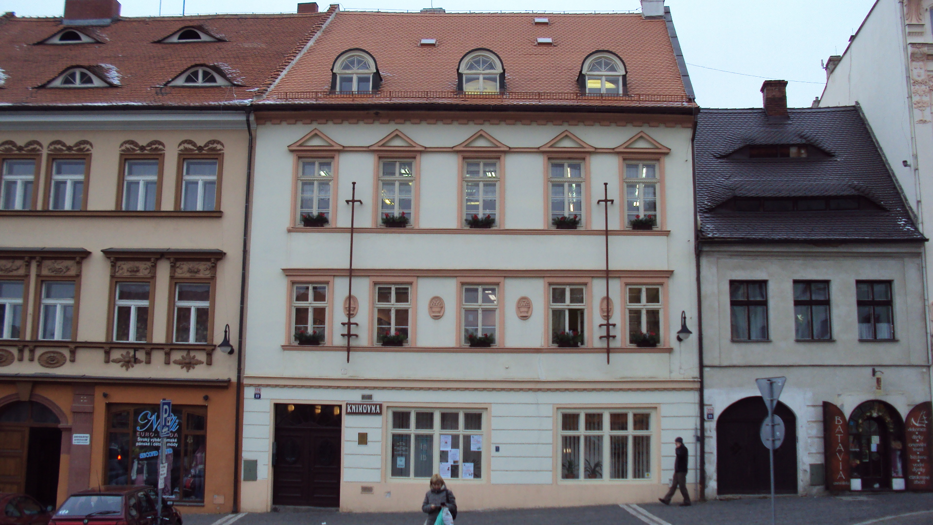 Budova městské knihovny, nám.T.G.Masaryka, střed města Česká Lípa